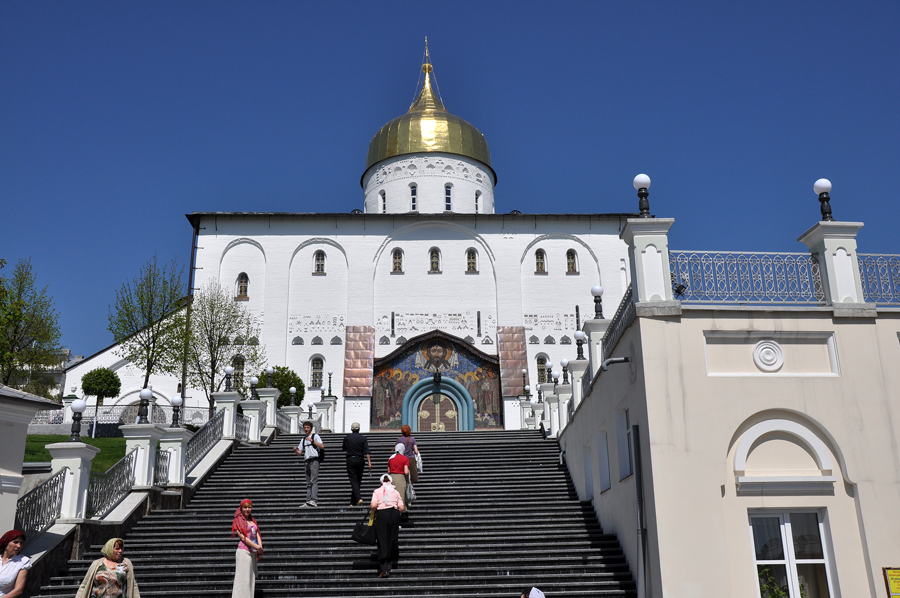 Троїцький собор, Почаїв, пл. Возз'єднання